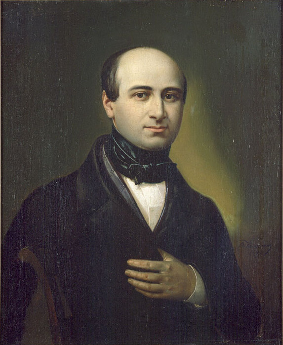 Nach dem Tod des beliebten Kölner Armenarztes und Arbeiterführers Andreas Gottschalck wollte sein Freund Heinrich Hölscher eine kleine Broschüre über Gottschalck herausgeben, musste aber feststellen, dass es kein geeignetes Porträt des Geehrten gab. Er bat also den Kampfgefährten und Maler Wilhelm Kleinenbroich (Köln 1814 - 1895 ebd.), "den lieben Todten nach .... Zeichnungen und aus der Erinnerung in Öl" zu malen. "Wie sein Gemälde gelungen, darüber bloß eine Stimme: ohne Kleinenbroichs Arbeit wäre es mit dem Portrait nichts gewesen."